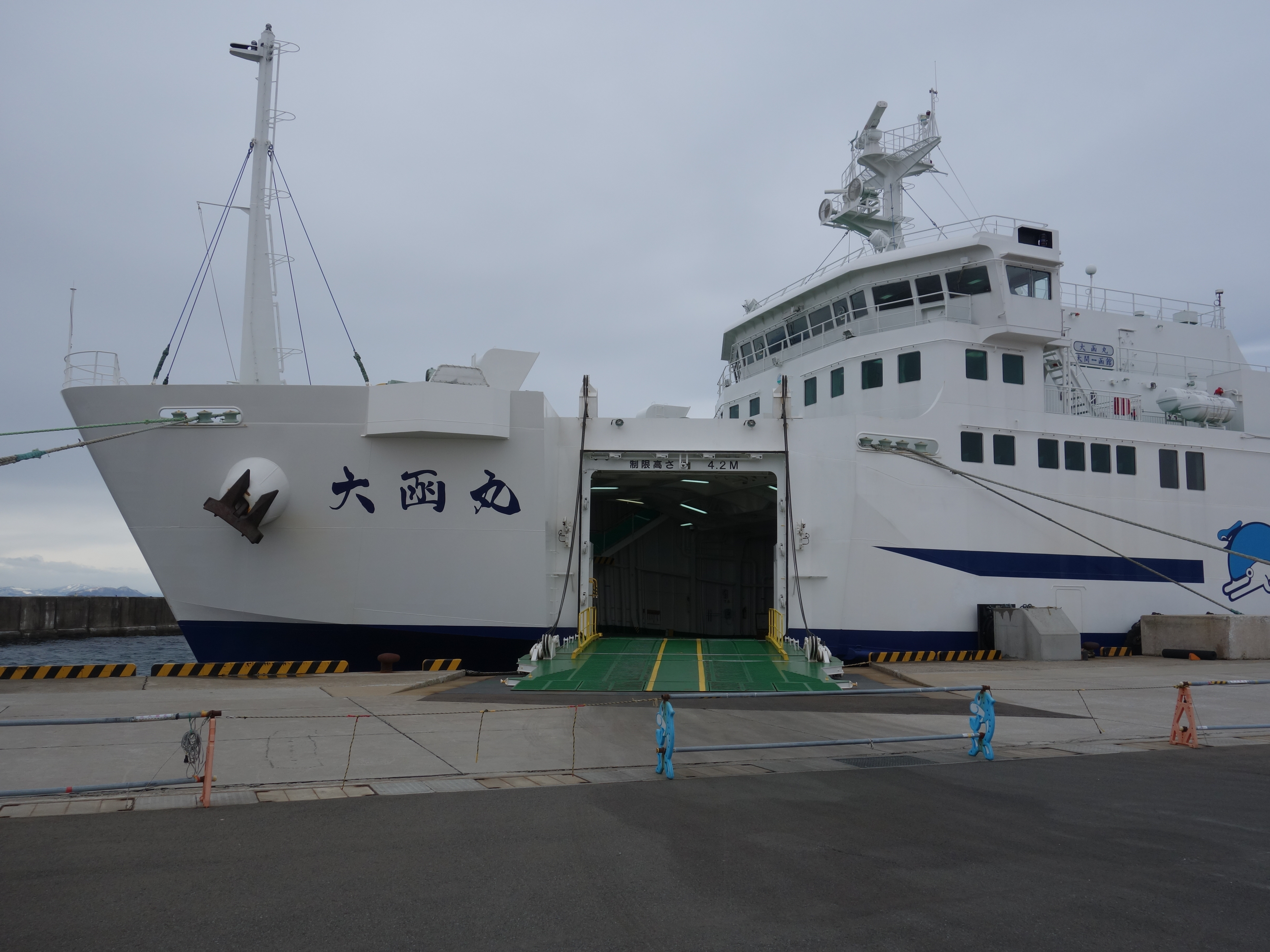 大間港停泊中の大函丸